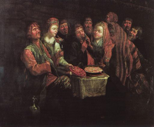 Вишняков Александр Иванович. Крестьянская пирушка. XVIII в. (Источник: Брук Я.В. У истоков русского жанра : XVIII век. – М. : Искусство, 1990. – С. 130.)